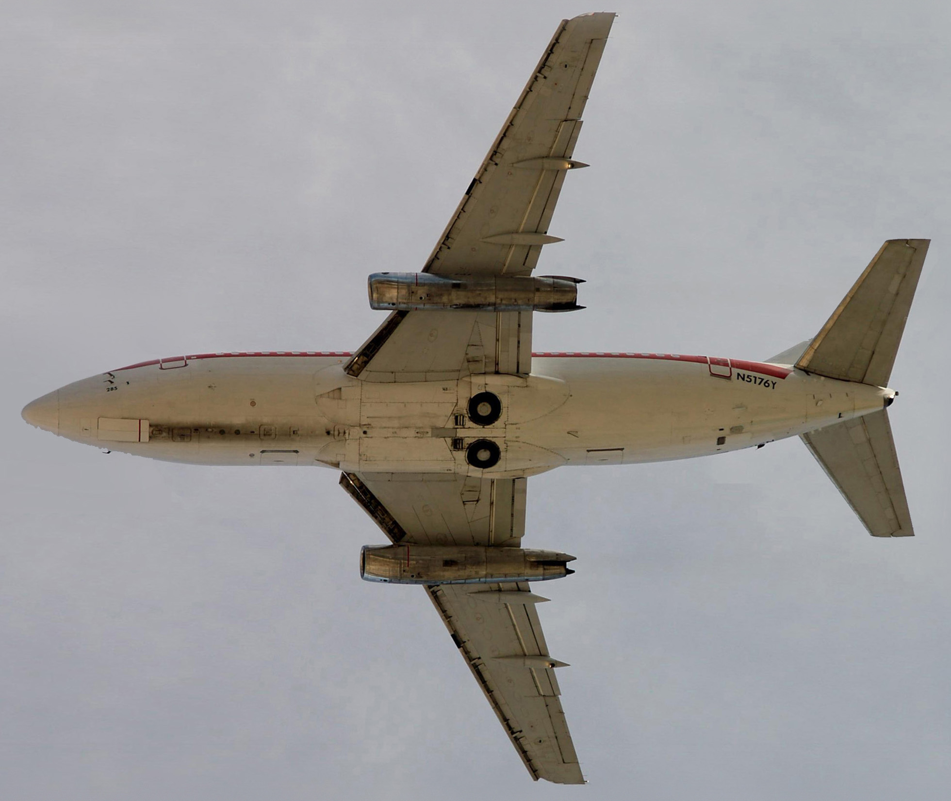 G&G Janet Boeing CT-43A (737-253/Adv) N5176Y Overhead